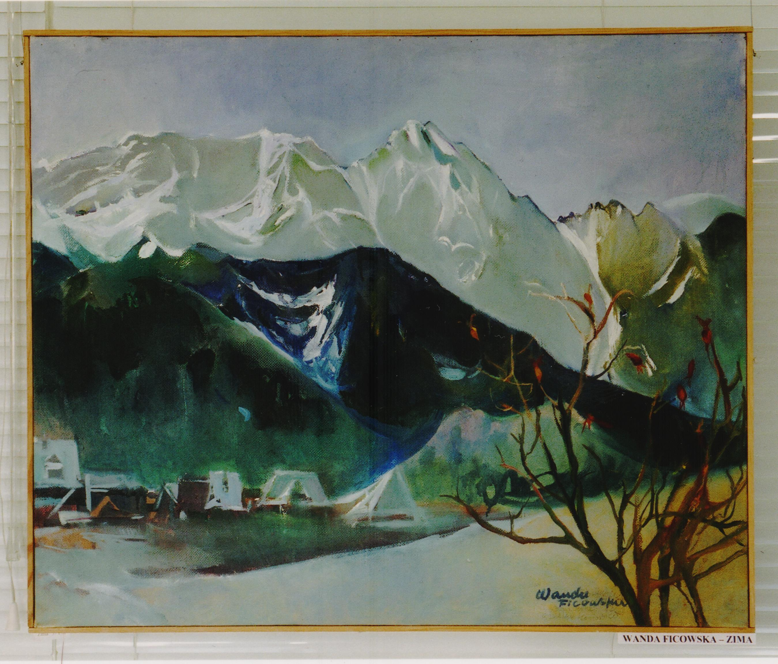 Wanda Ficowska - Zima